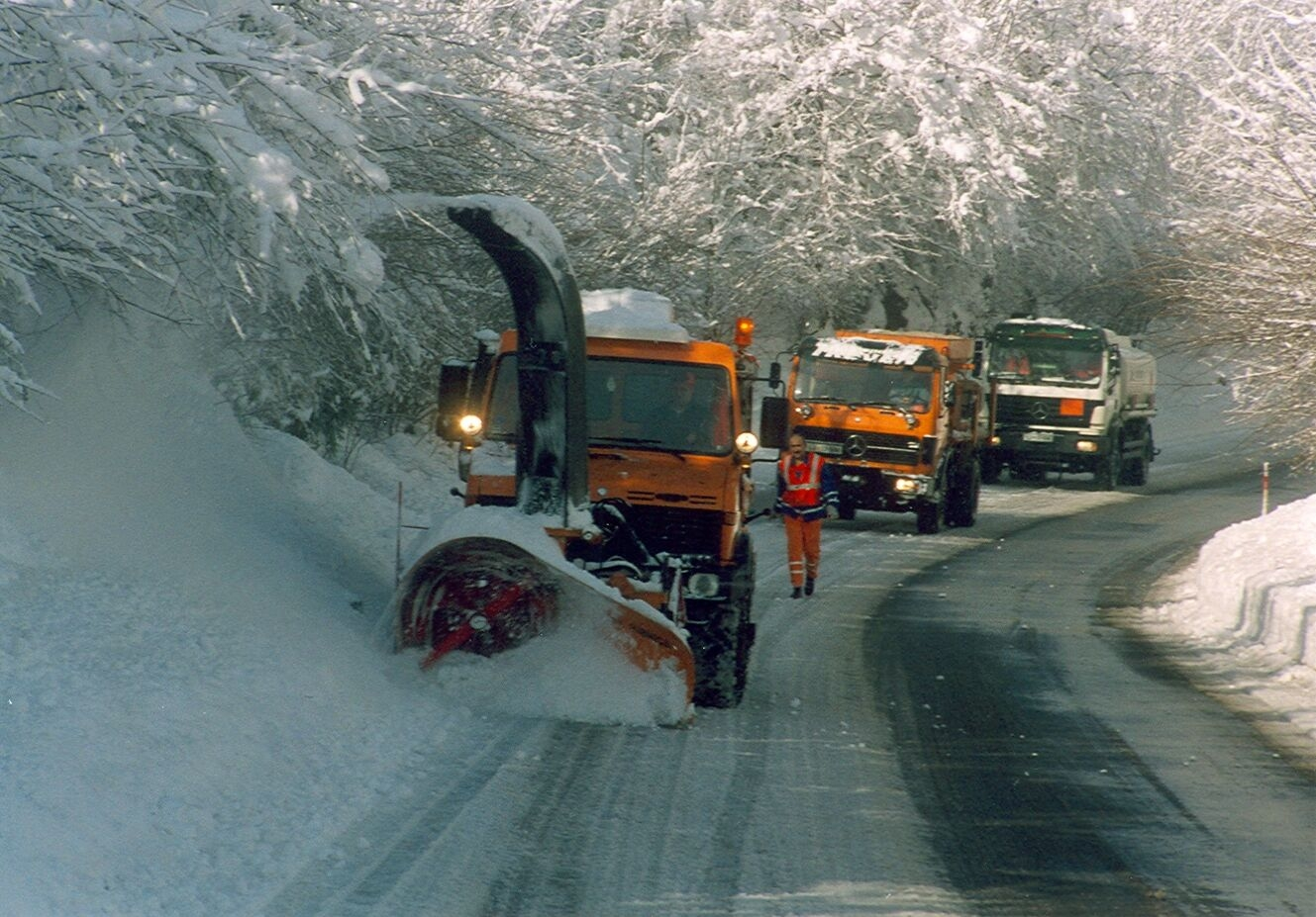 Pluženje ceste na Pokljuko